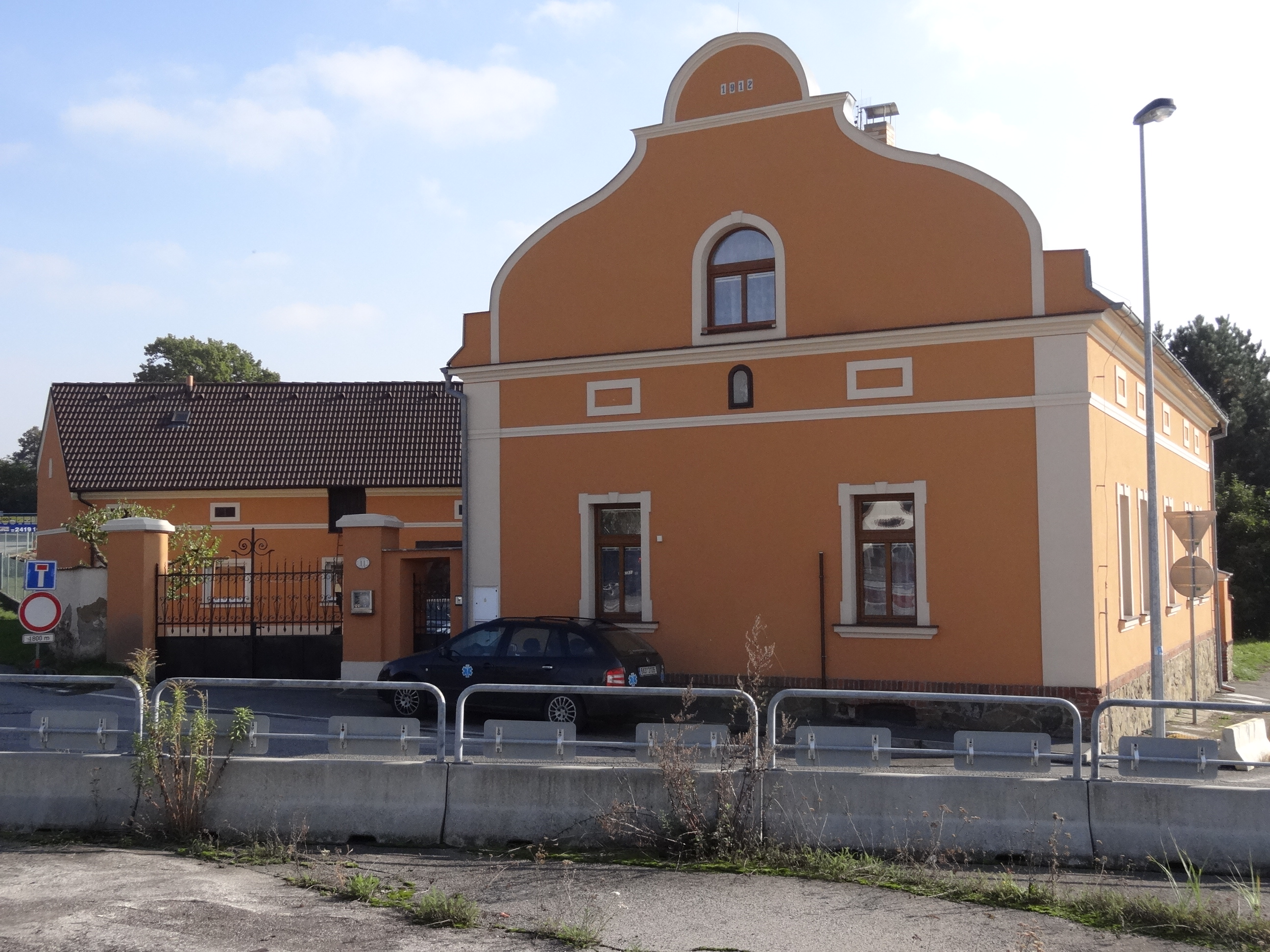 Točná - náměstí Antonína Pecáka 11